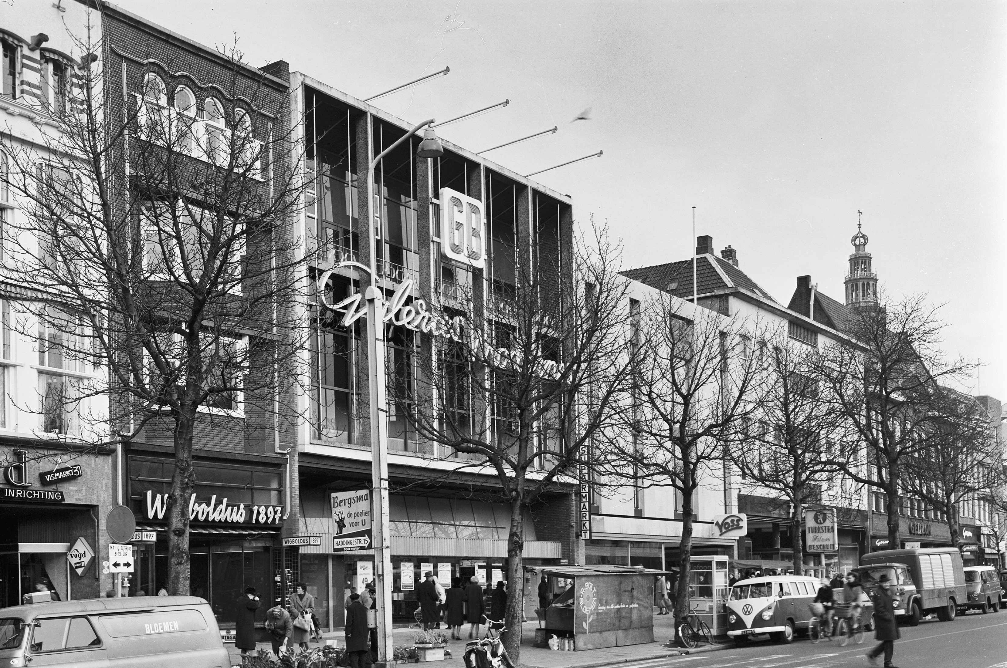 De noordzijde van de Vismarkt in Groningen